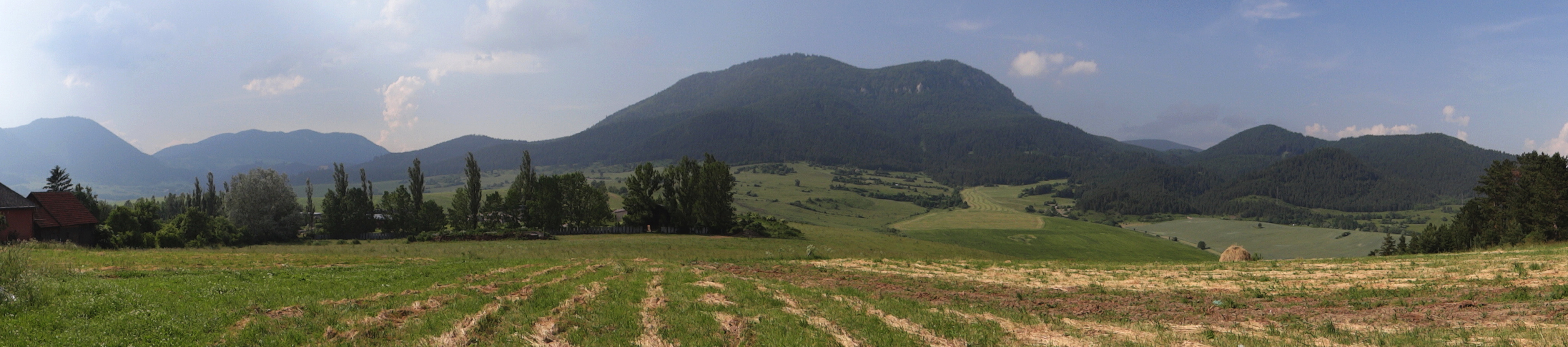 Panorama Grupy Wielkiego Chocza od południowej strony